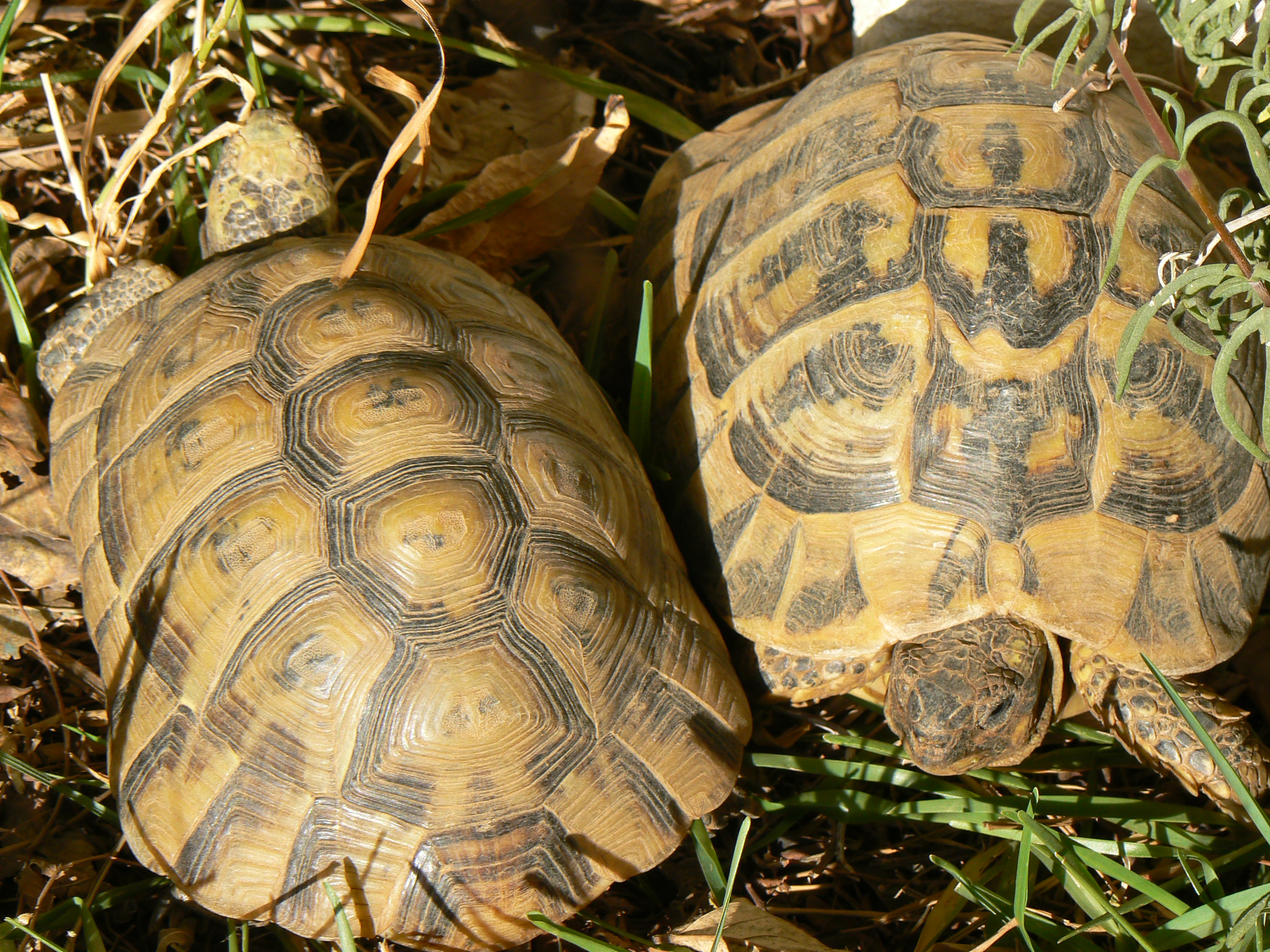 Testudo graeca à gauche et testudo hermanni à droite, Algérie.